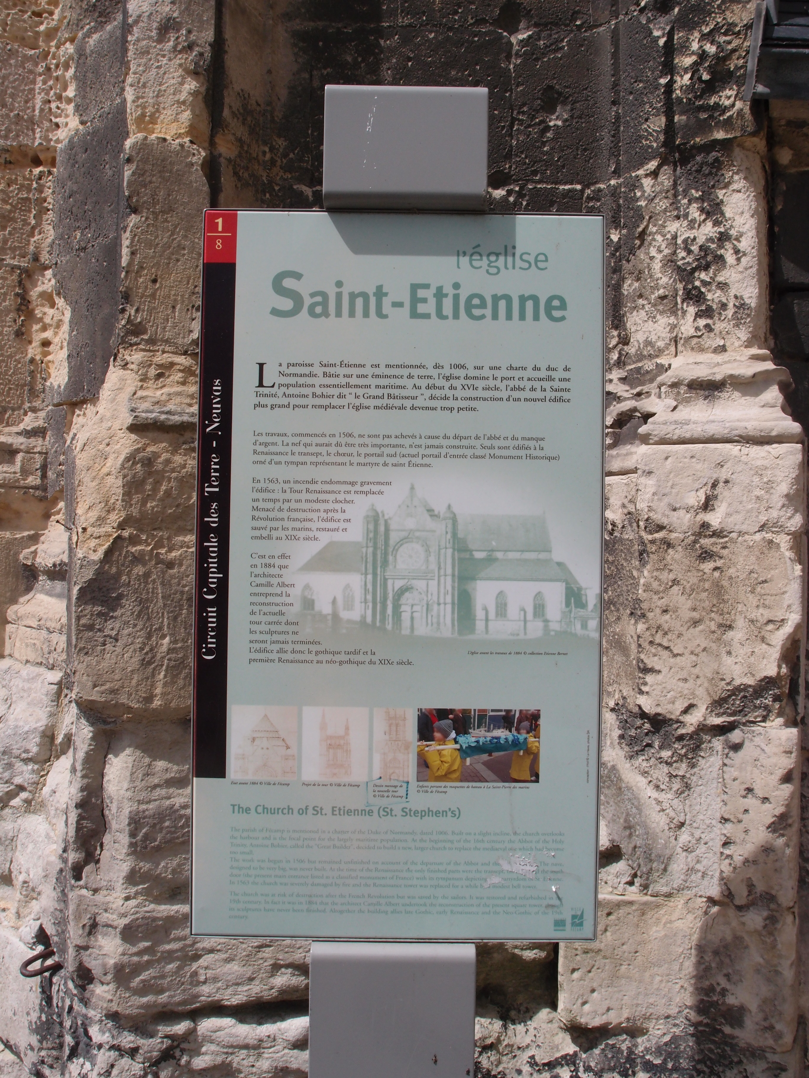 Fécamp: Kirche Saint-Etienne - Historie (franz.: Église Saint-Étienne de Fécamp) Datum: 15.05.2012 Urheber: M. Pfeiffer alias Benutzer:Gordito1869 Quelle: privates Fotoarchiv des Urhebers